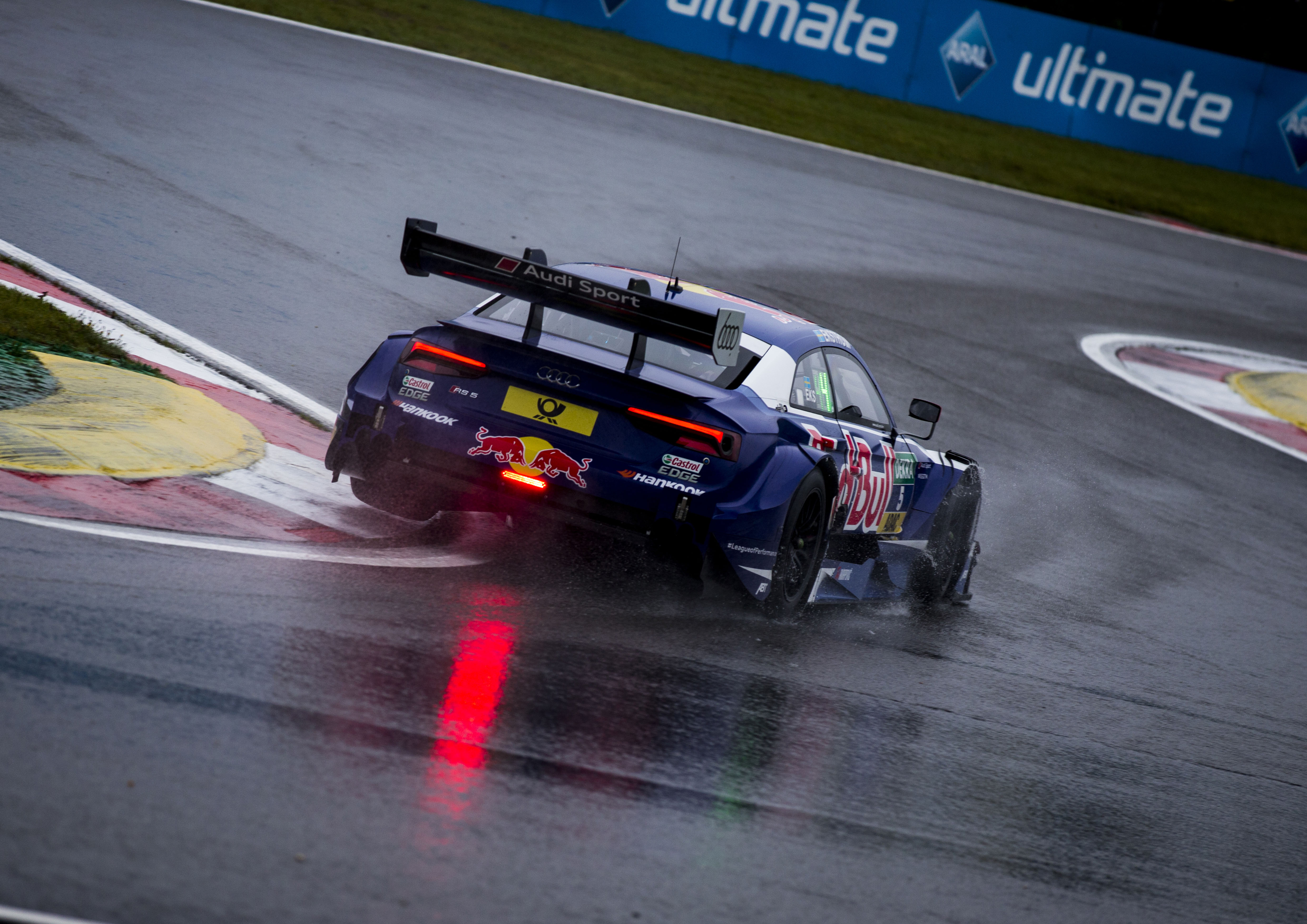 Mattias Ekström, Red Bull Audi RS 5 DTM, DTM Nürburgring 2017